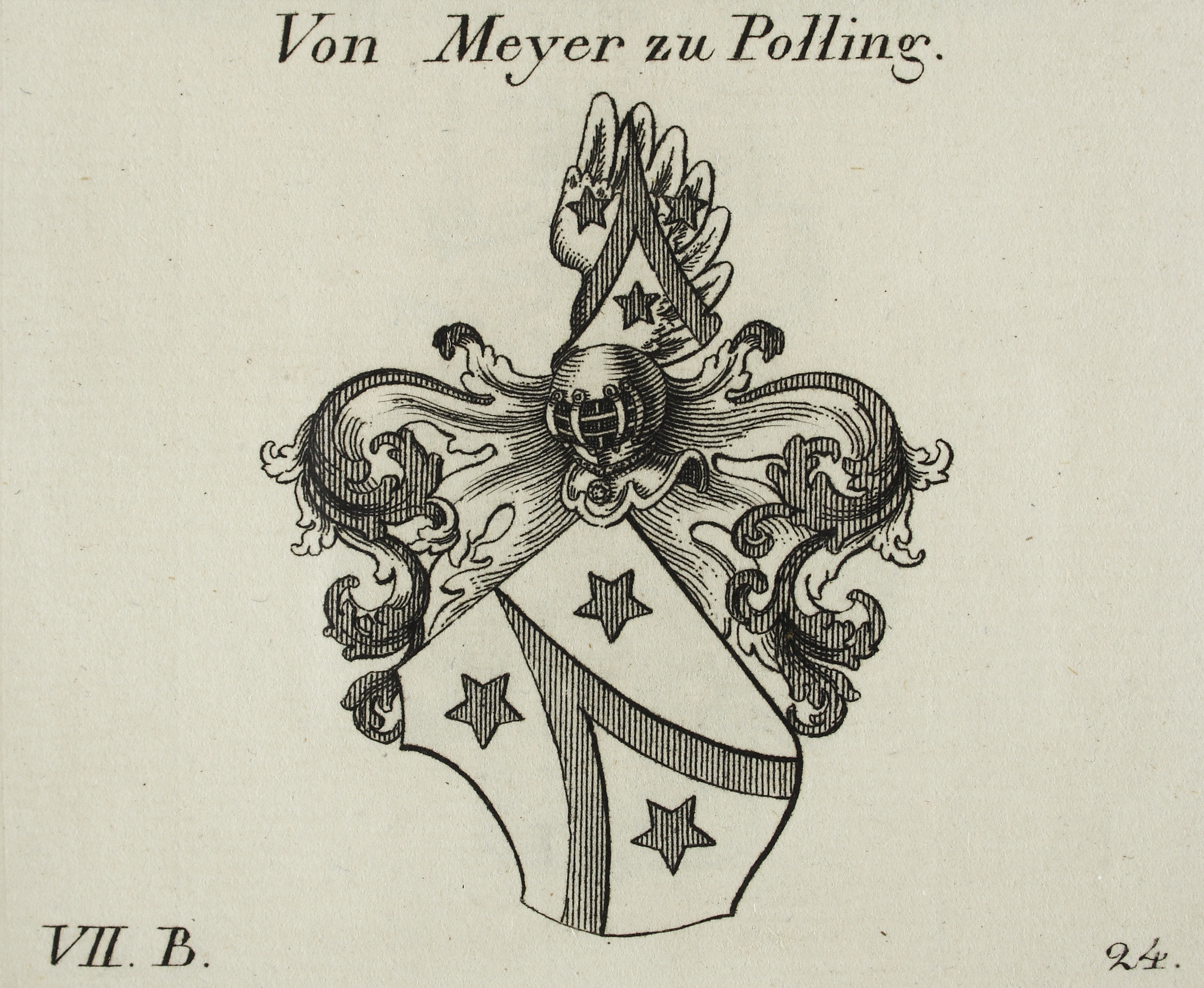 Wappen von Meyer zu Polling (1814).